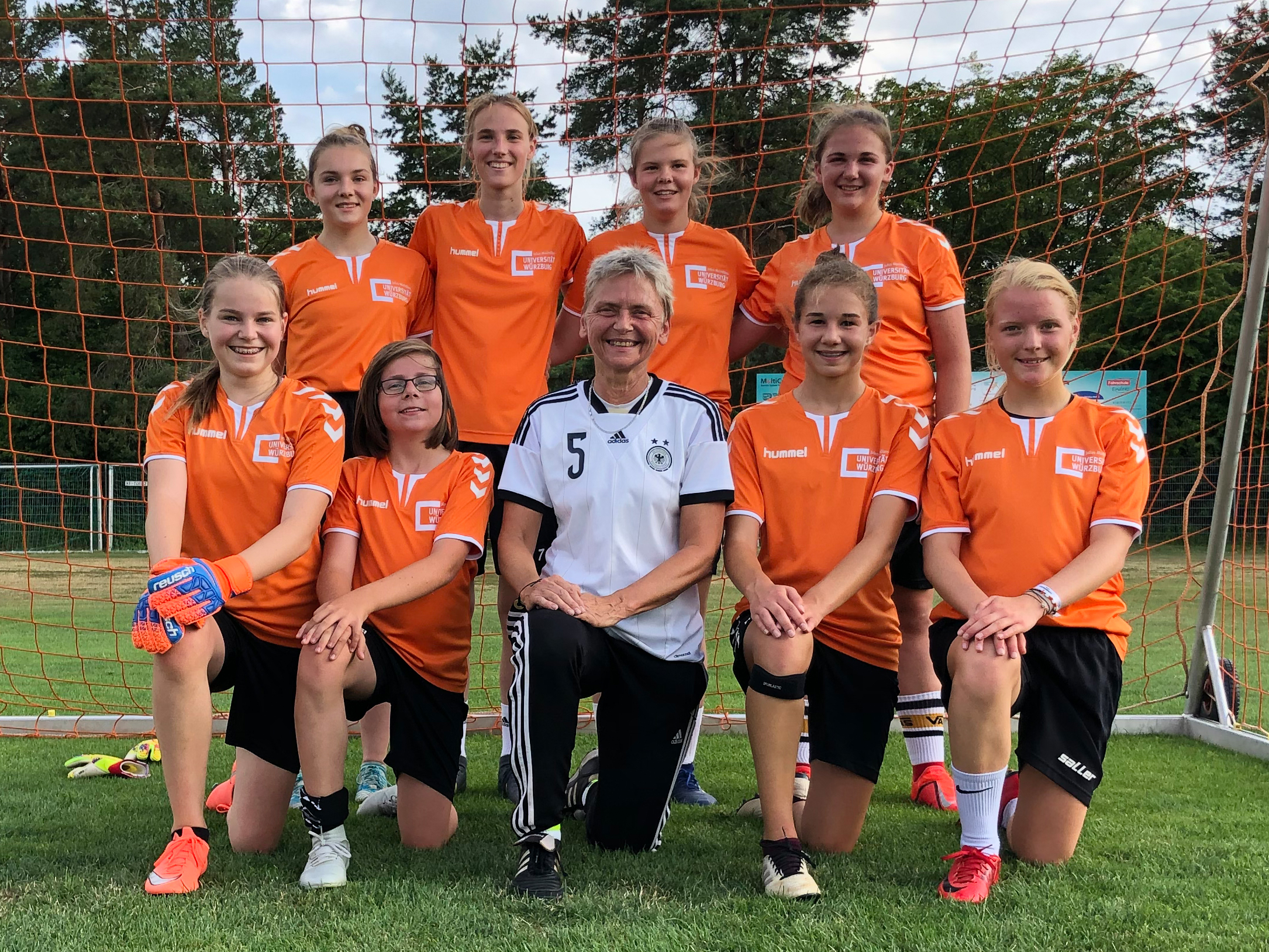 Die Ex-Nationalspielerin und Europameisterin Petra Landers besucht im Rahmen des Projekts "PowerGirls go Wikipedia" die Würzburg Dragons, den Juniorinnenfußball des Sportclub Würzburg.